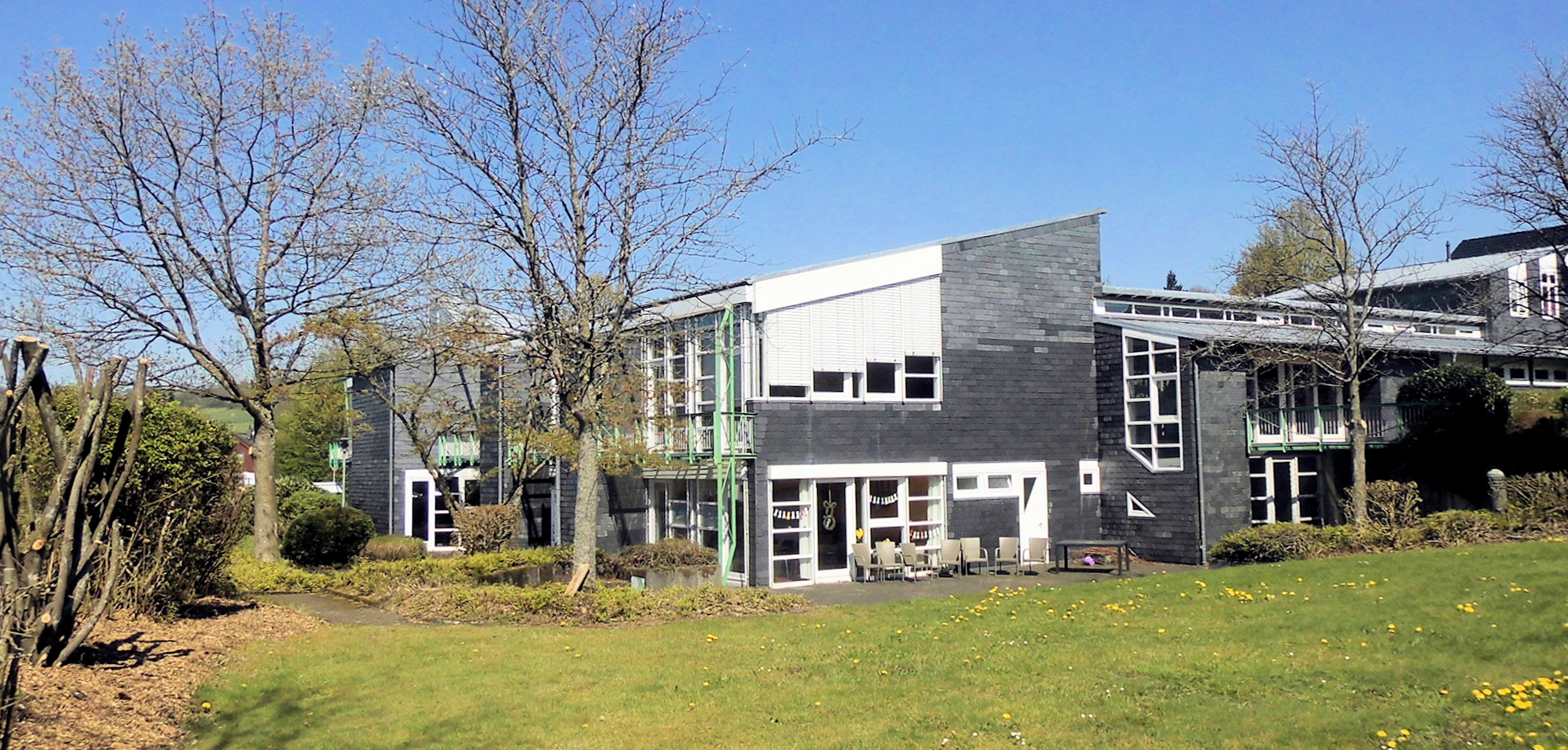 Paul Schneider-Haus in Oberwiehl, Stadt Wiehl, Oberbergischer Kreis, Nordrhein-Westfalen, Deutschland